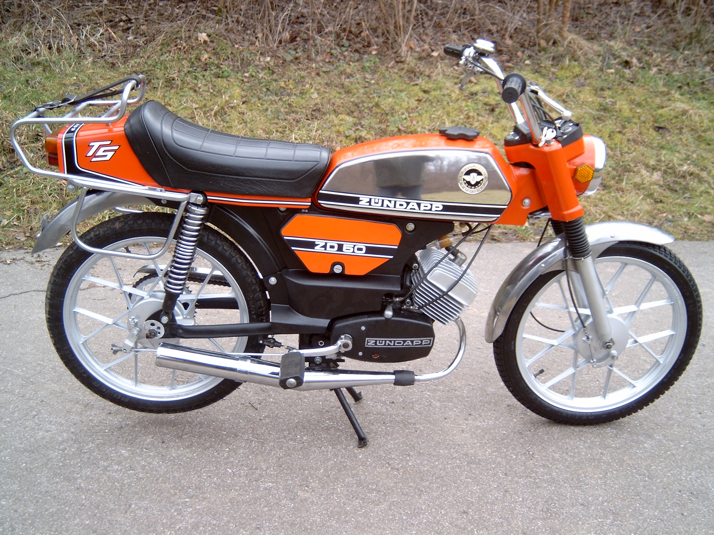 Vollständig originale ZD 50 im Neuzustand.